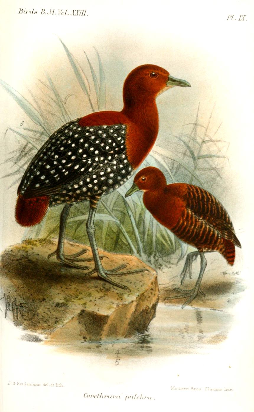 Cerethrura pulchra (=Sarothrura pulchra)